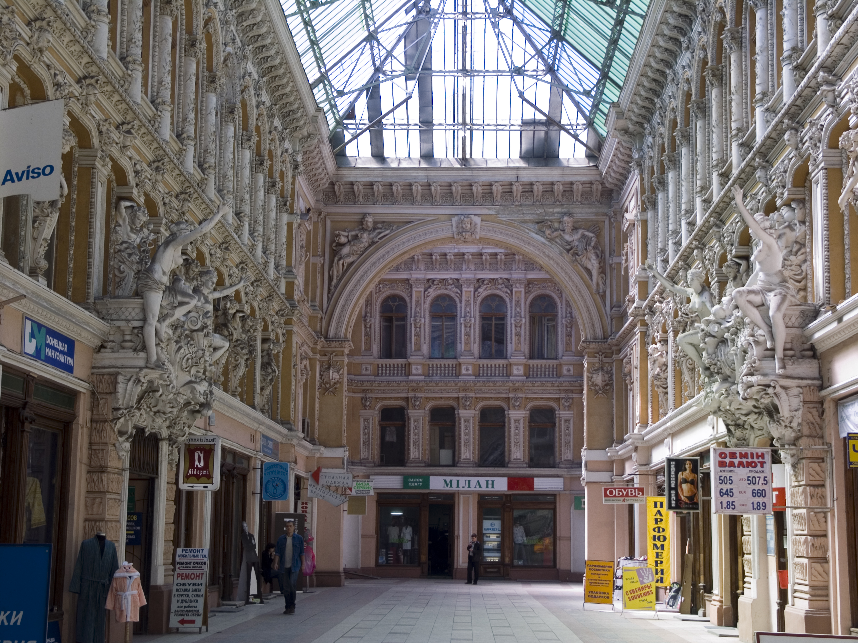 Україна, Одеса - Пасаж та готель “Пасаж”, де у 1921–1923 рр. містився штаб 51-ї Перекопської дивізії, якою командували В. К. Блюхер і П. Є. Дибенко